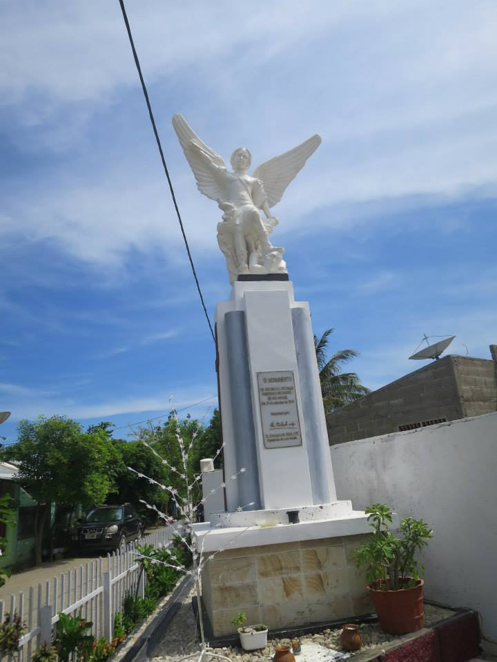 Dili